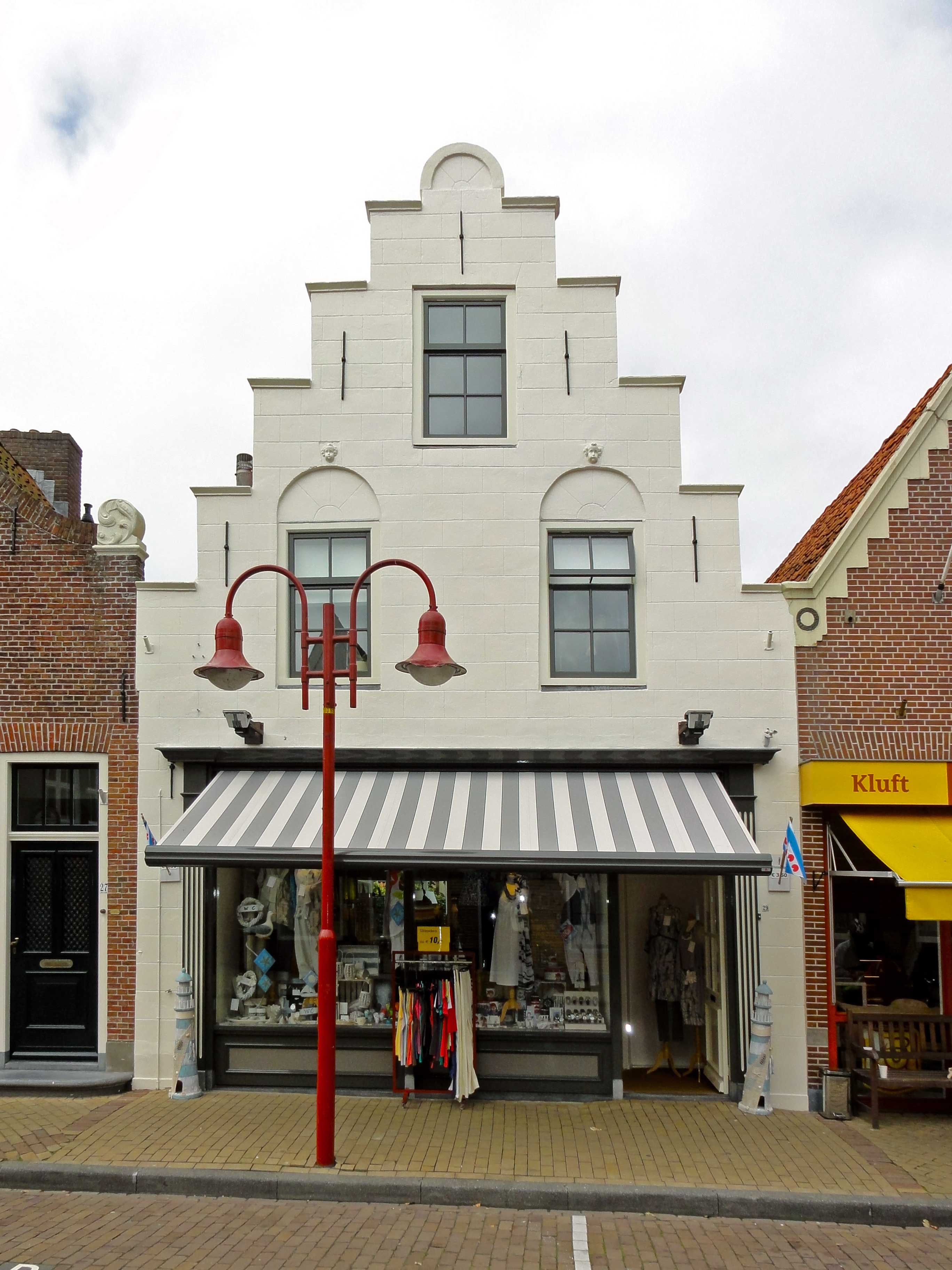 Kerkstraat 29 te Makkum